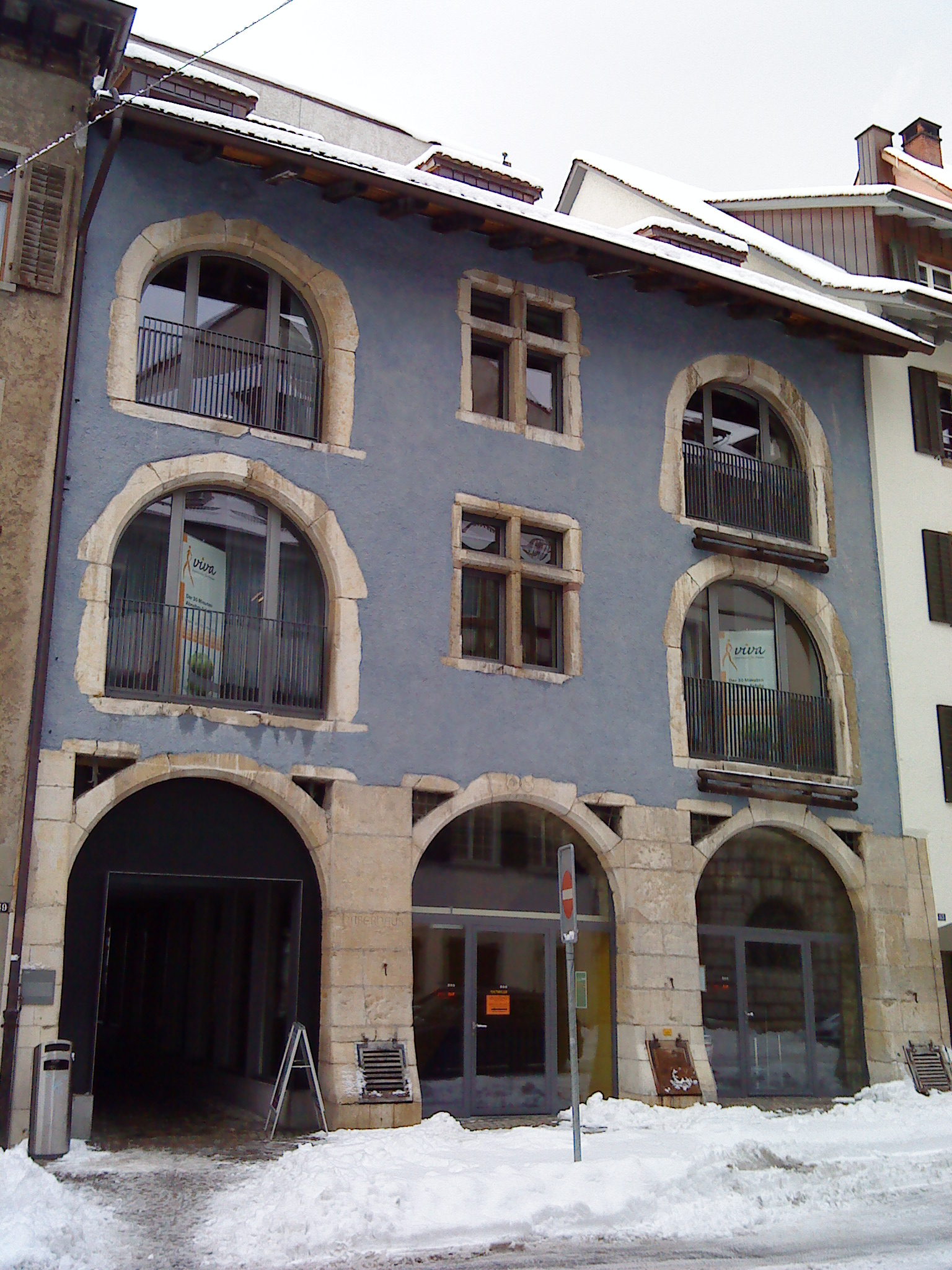 Haberhaus, Neustadt 51, Schaffhausen/Schweiz.